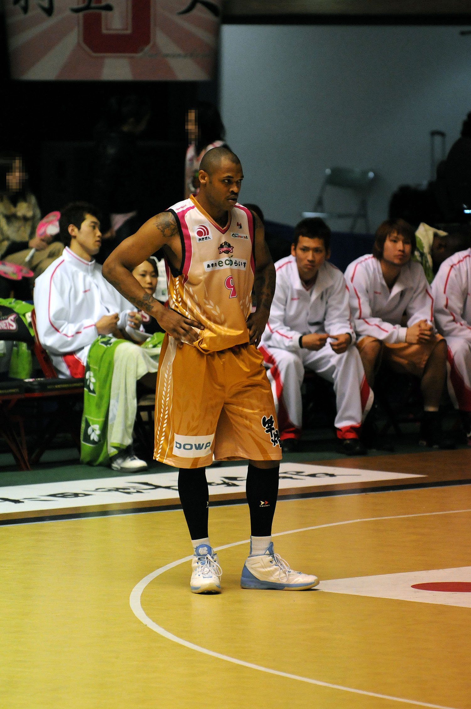 秋田ノーザンハピネッツ、ウィル・グレイヴス選手。秋田県立体育館で。